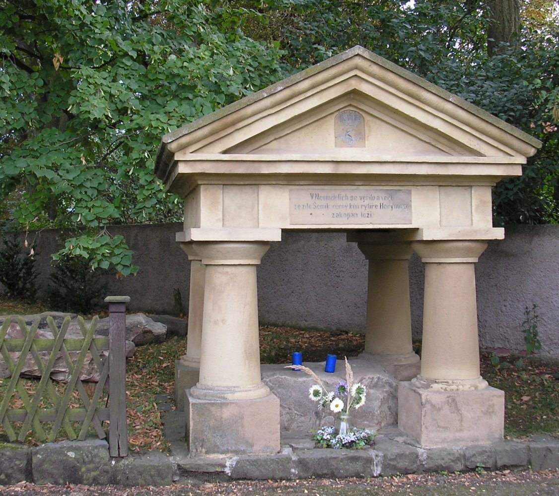 "V Neumětelích se věřilo a věří, že zde Šemík, věrný kůň rytíře Horymíra, zakopán leží" Neumětely, Beroun District - Alleged burial site of Horymír's horse Šemík from an old Czech legend